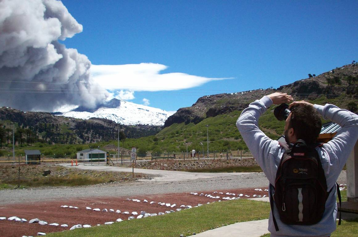 Columna y pluma de cenizas de la erupción del volcán Copahue de 2012